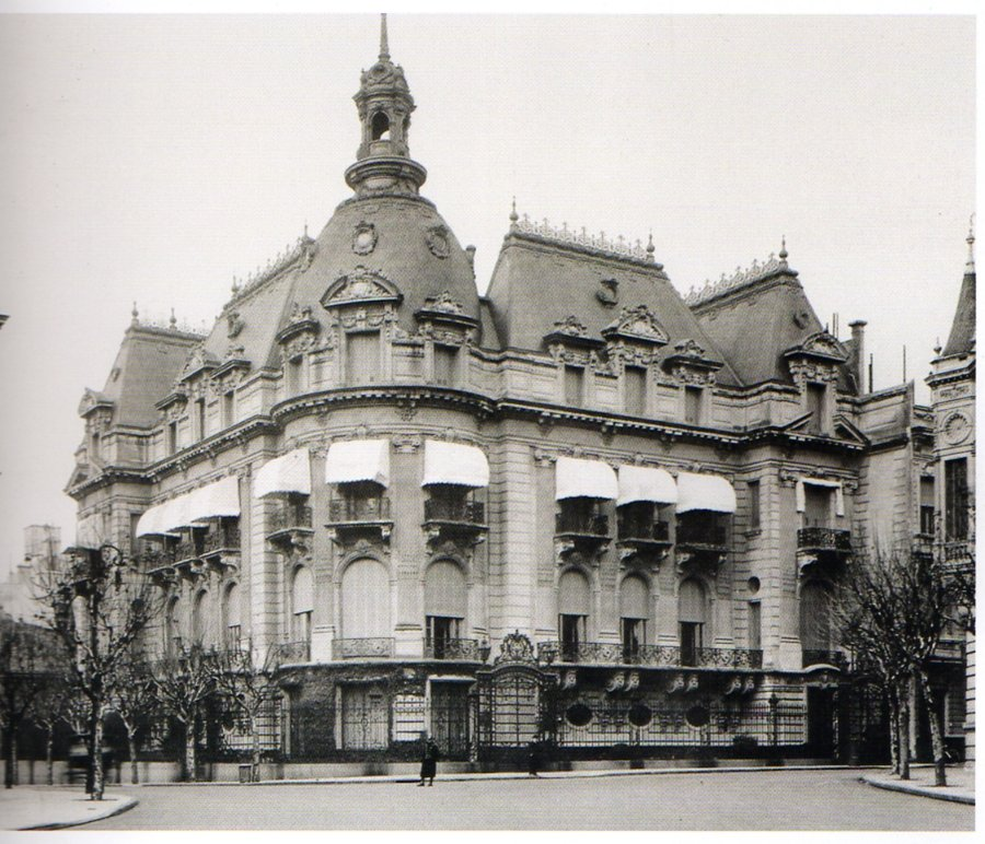 Aspecto original del Palacio Ortiz Basualdo, actual Embajada de Francia en Buenos Aires (Argentina). Construido en 1912 según el proyecto del arquitecto francés Gastón Mallet, años más tarde perdió parte de su ornamentación en la fachada, y en la década de 1980 se salvó de la demolición por la Avenida 9 de Julio.